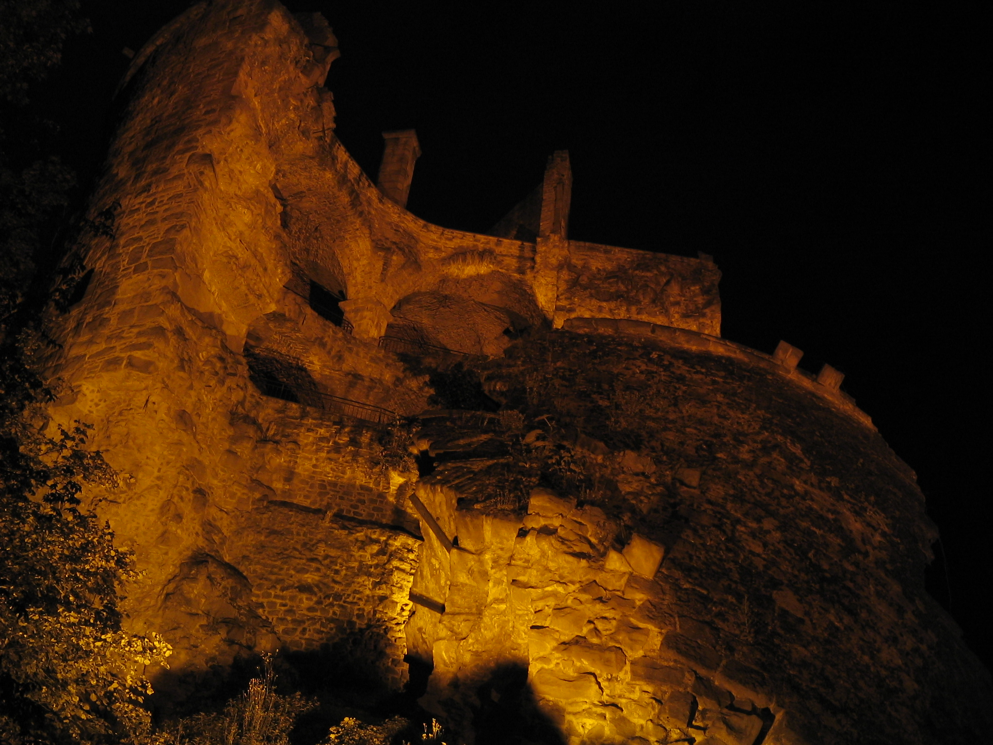 Ruine des Waffenturms beim Heidelberger Schloss - Nr. 001 Ruin of the weapon tower at Heidelberg Castle - No. 001